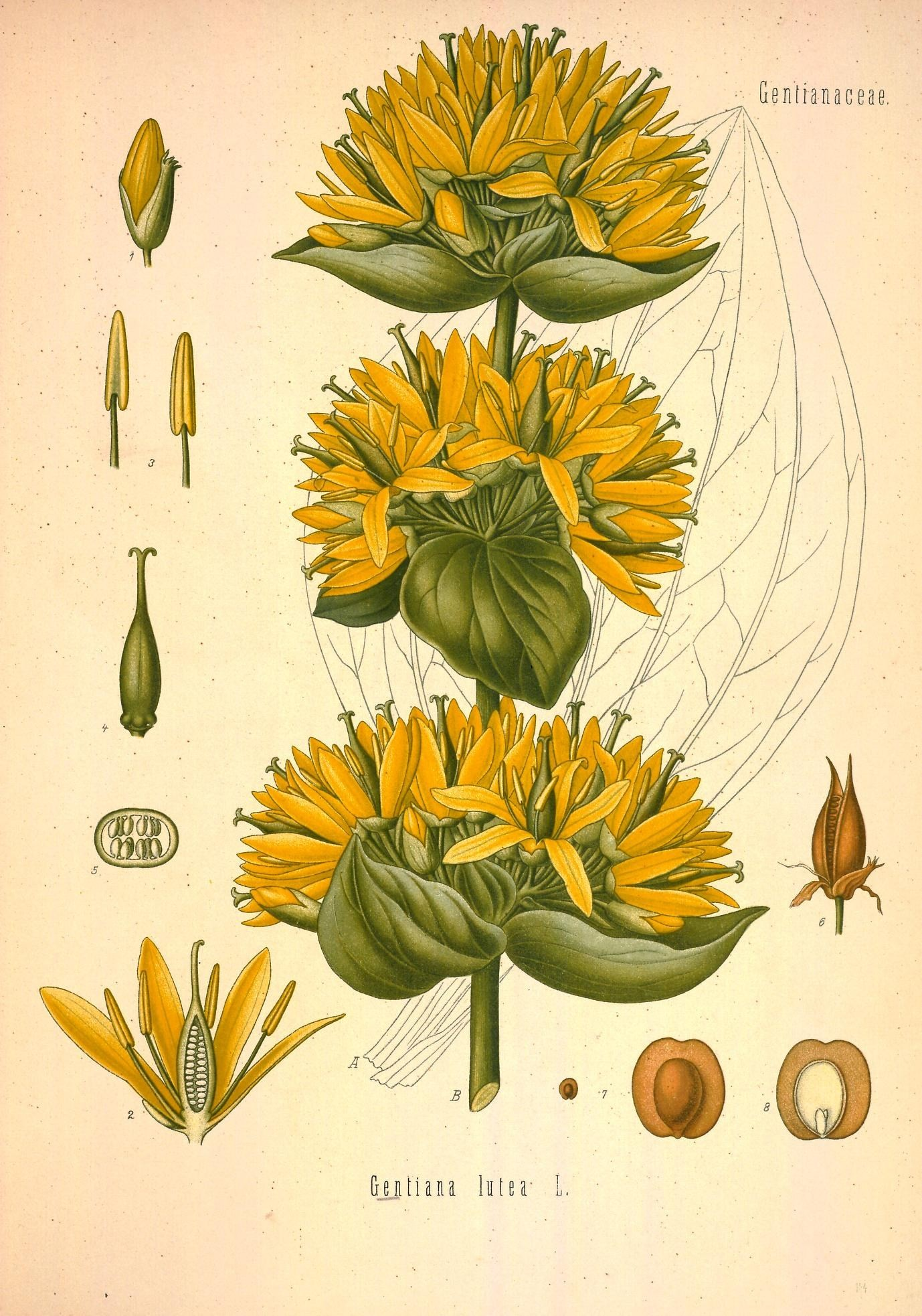 Gelber Enzian. A Basalblatt, natürl. Grösse; B oberer Theil eines blühenden Stengels, desgl.; 1 Blüthenknospe, etwas vergrössert; 2 Blüthe im Längsschnitt, vergrössert; 3 Staubgefässe, desgl.; 4 Stempel, desgl.; 5 Fruchtknoten im Querschnitt, desgl.; 6 aufgesprungene Frucht, natürl. Grösse; 7 Same, natürl. Grösse und vergrössert; 8 derselbe im Längsschnitt, vergrössert.